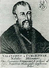 Valentin Ostertag, called Valentin von Türckheim